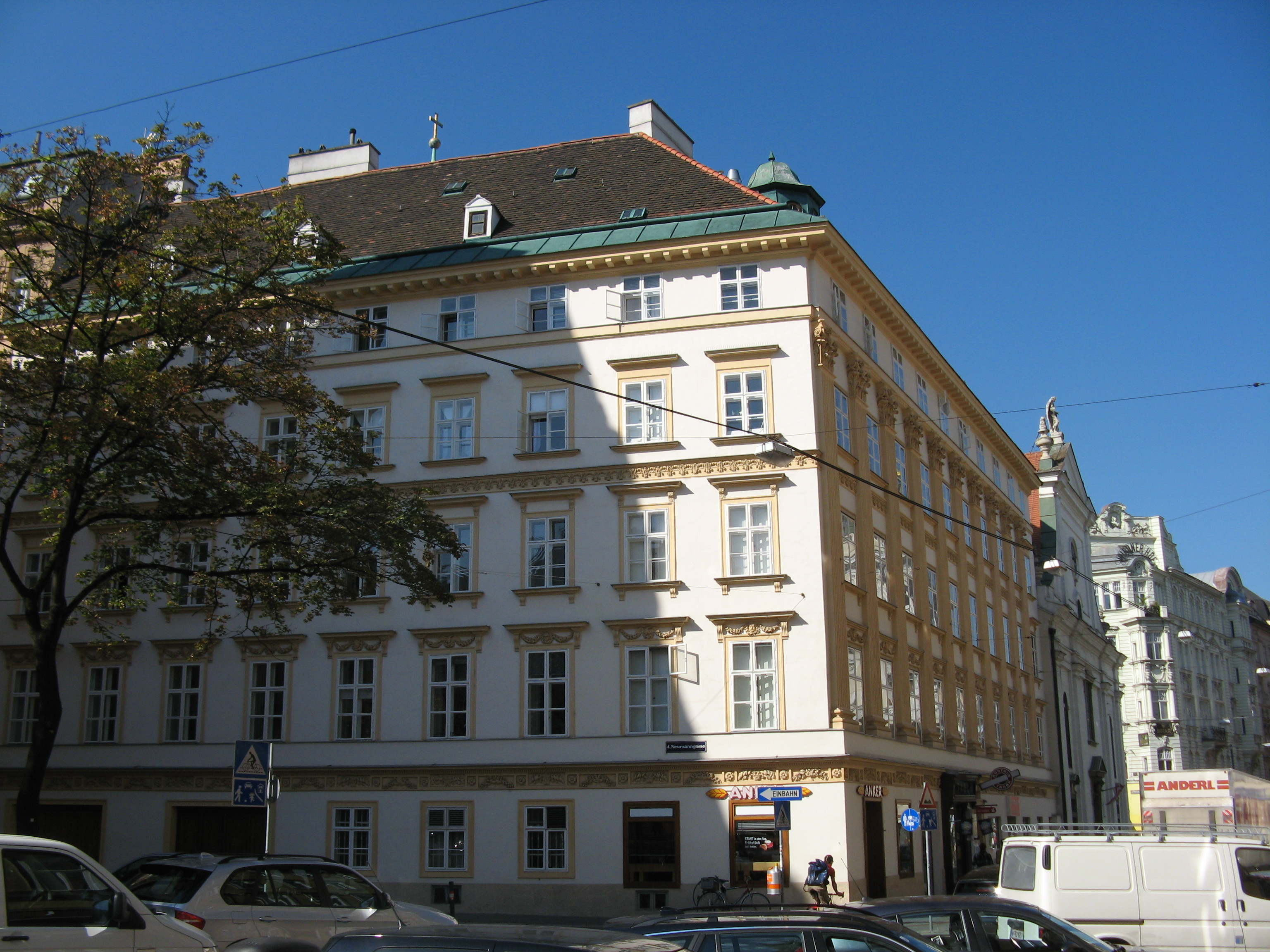 Haus (1802) von Franz Wipplinger, Favoritenstraße 2, Wien-Wieden